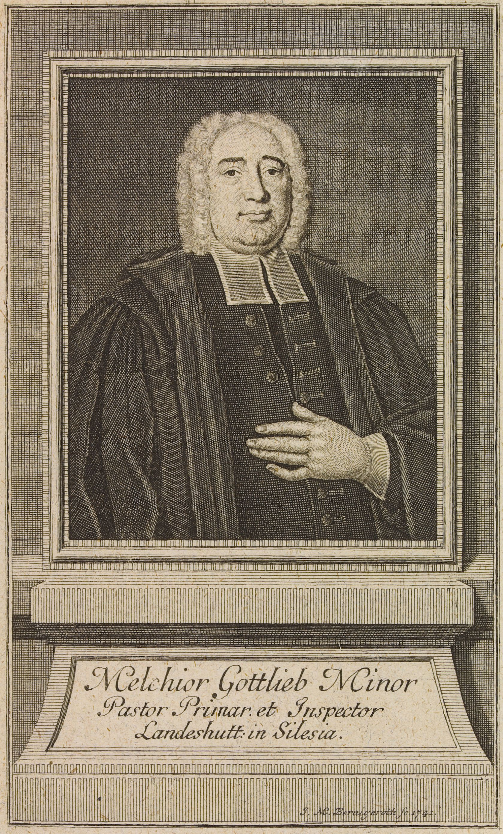 Melchior Gottlieb Minor Pastor Primar et Inspector Landeshutt in Silesia